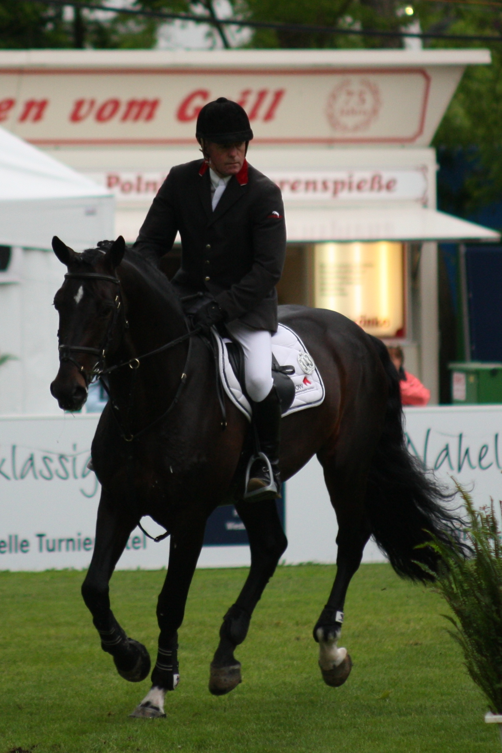 77. Internationanles Wiesbadener Pfingstunier 2013, CSI***** Eröffnungsspringen, John Whitaker auf Argento Personality rights warningAlthough this work is freely licensed or in the public domain, the person(s) shown may have rights that legally restrict certain re-uses unless those depicted consent to such uses. In these cases, a model release or other evidence of consent could protect you from infringement claims.